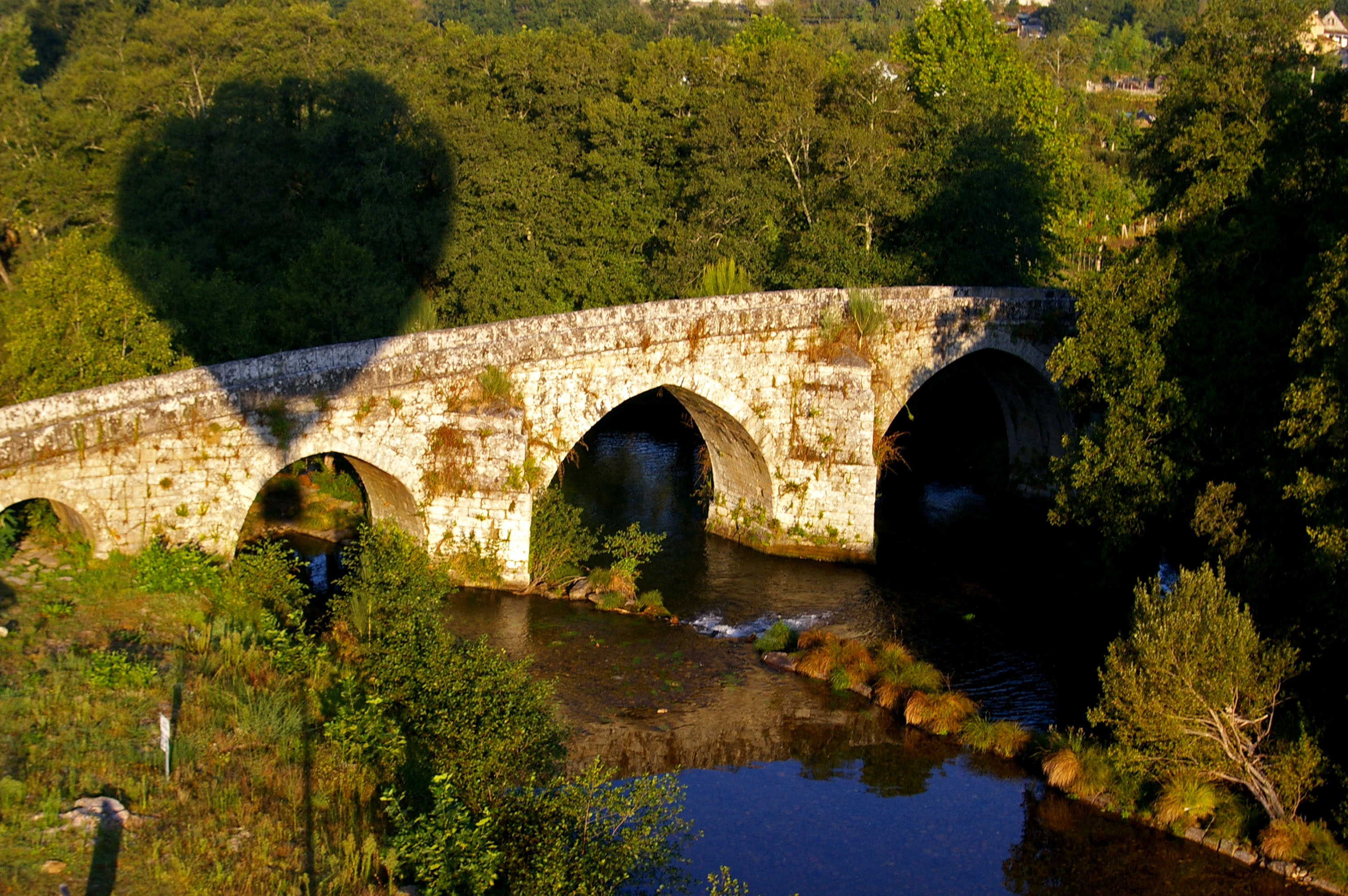 Ponte de Cernadela en Mondariz.